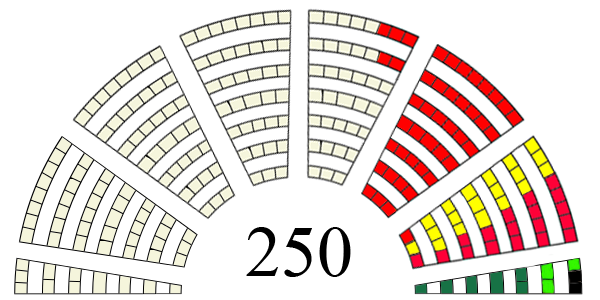 Parlamentarni izbori 2014 - raspodela mandata